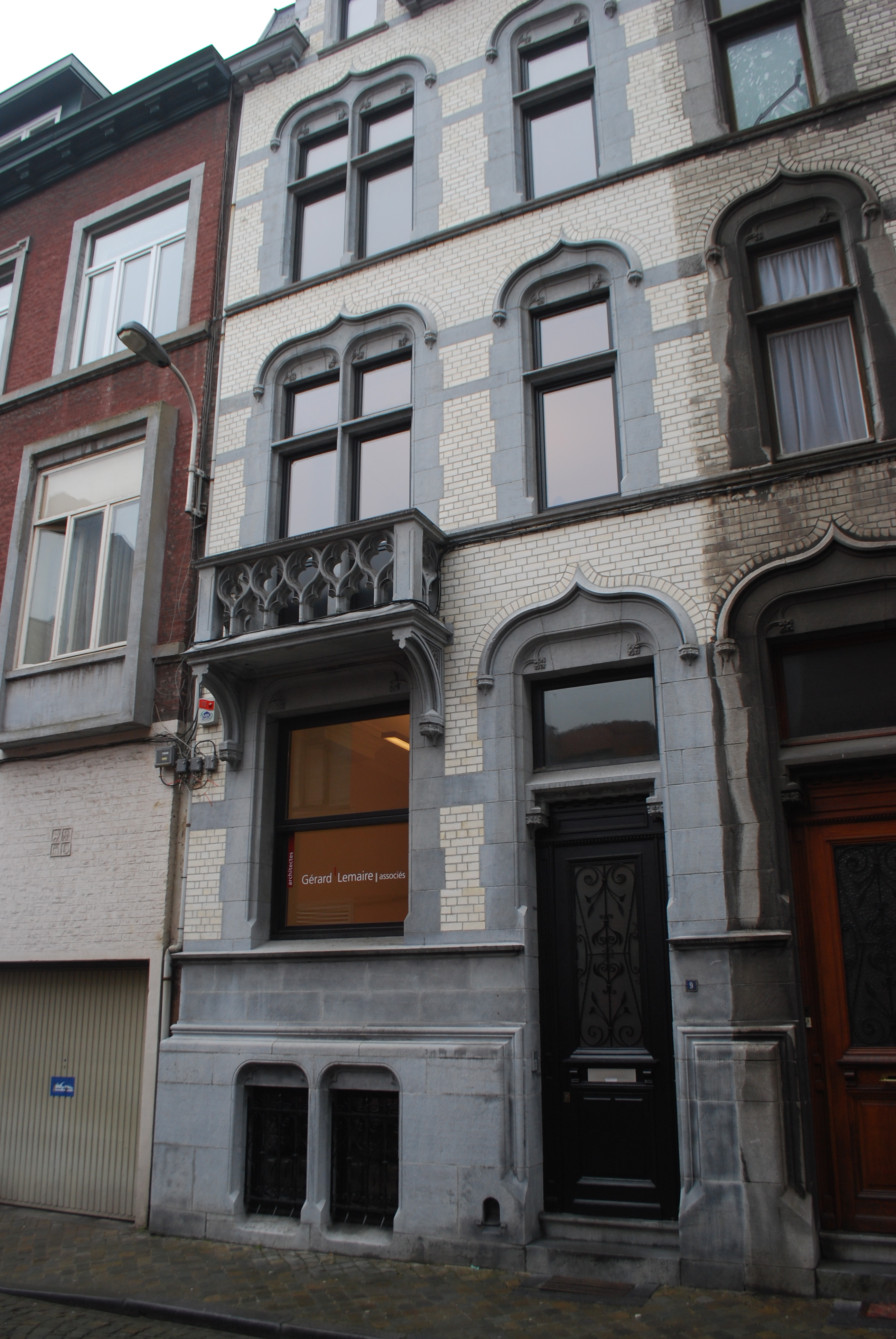 Vue d'une maison dans la rue Rouveroy à Liège.